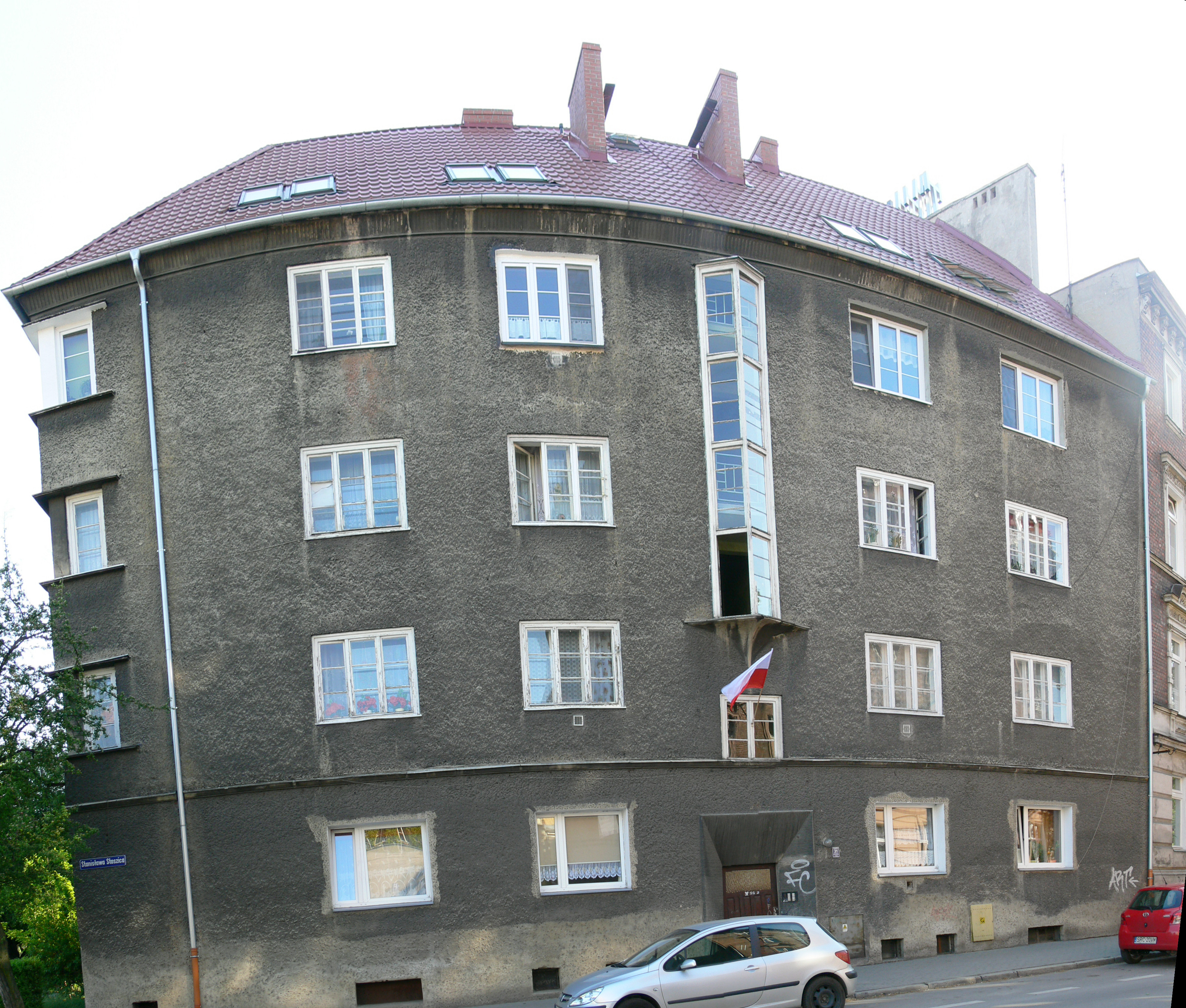 Racibórz - dom mieszkalny przy ul. Staszica 31